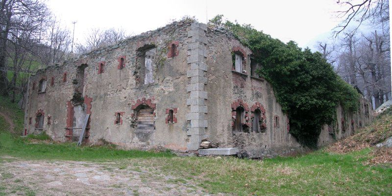 Facciate sud est del Forte di Machaby prima del restauro, Arnad, Valle d'Aosta, Italia.